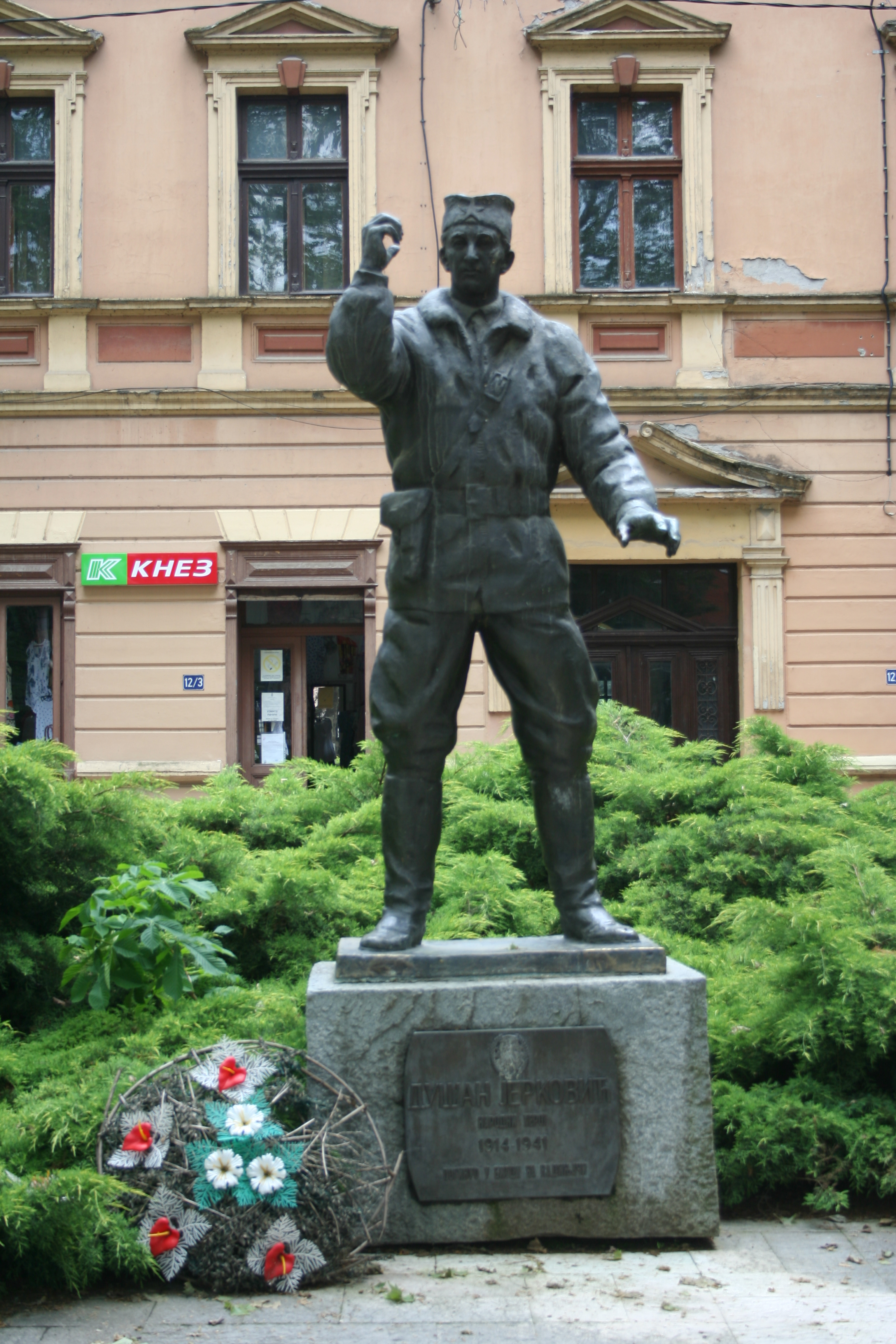 Bajina Bašta u maju 2017.